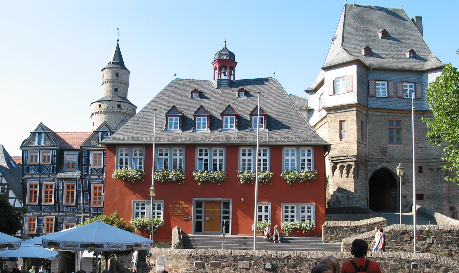 Description: Rathaus von Idstein Source: Selbst fotografiert, August 2003 Photographer/Painter: Ralf Ziegler, --RalfZi 22:29, 23 Mar 2005 (UTC)